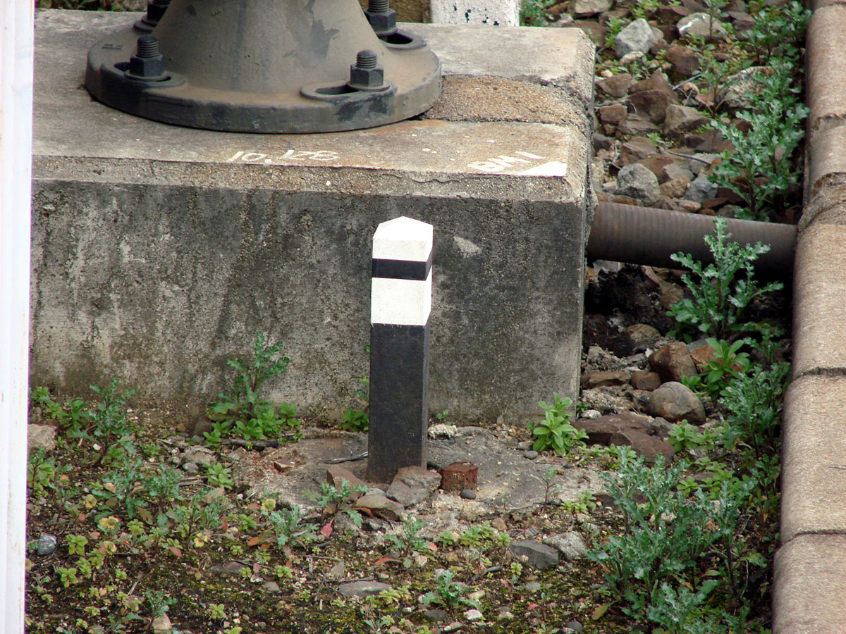 逓減標（近鉄）